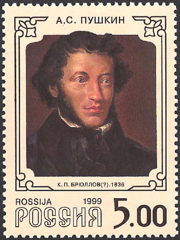 Почтовая марка России